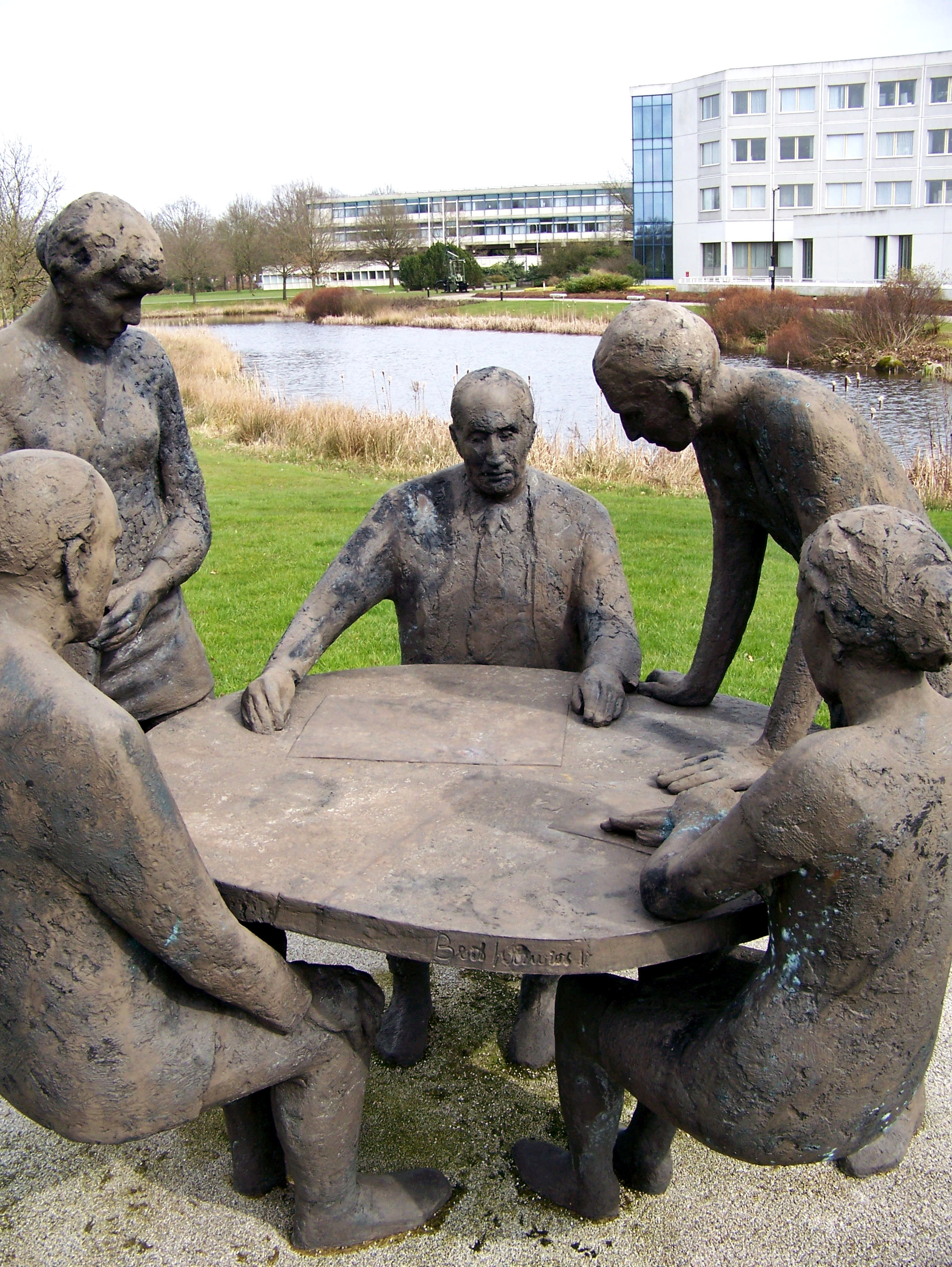 'Deliberation' (overleg), door Bert Kiewiet (1998) bij de NAM in Assen